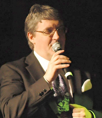 Žoržs Siksna in concert (Jelgava)